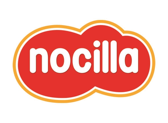 Logo de la marca Nocilla